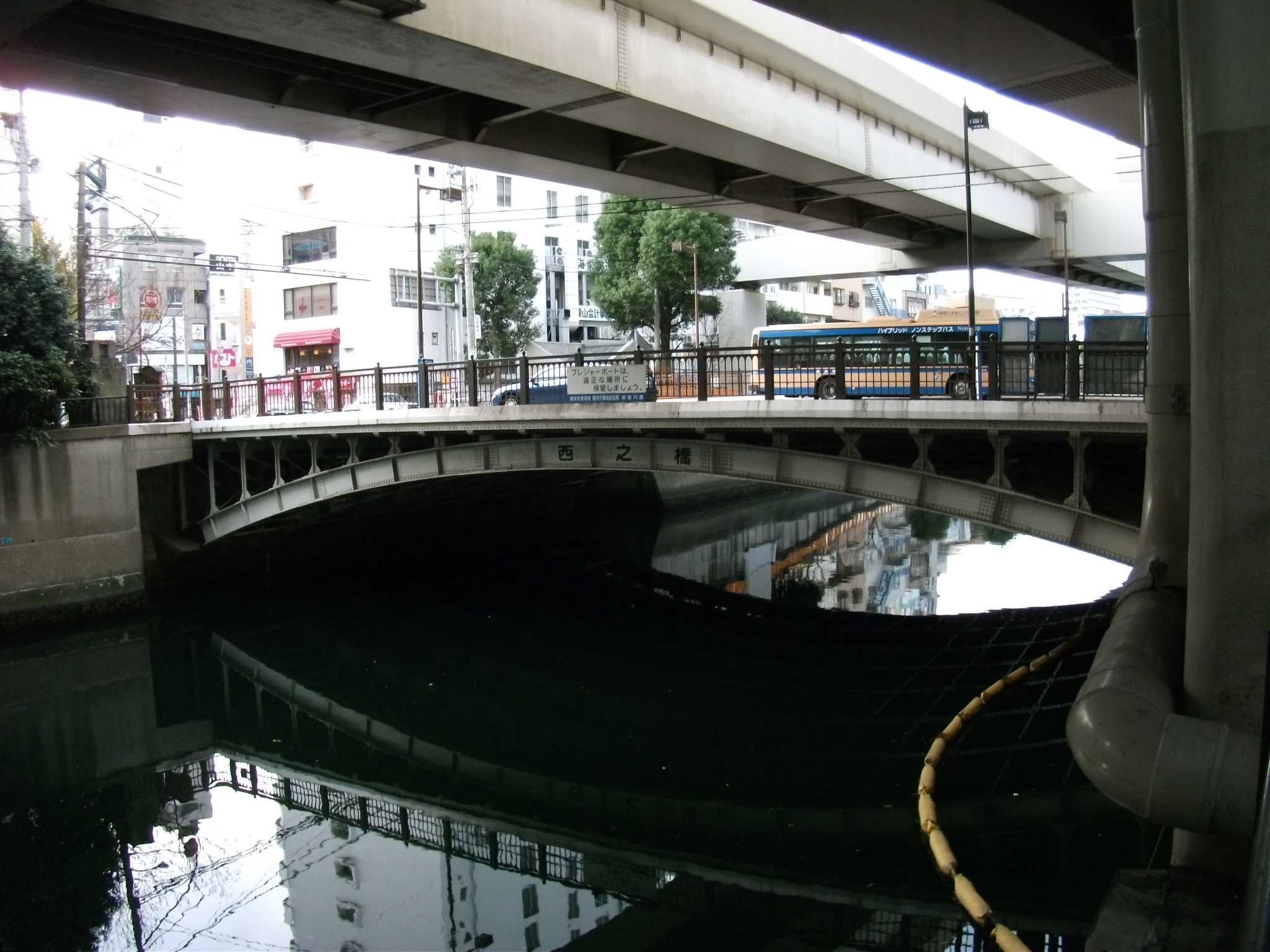 横浜市中区、西之橋